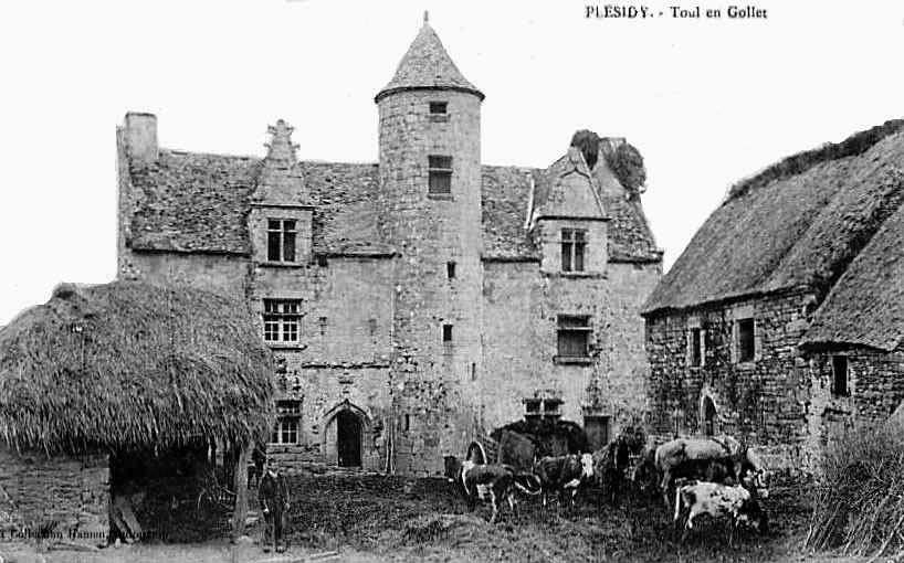 Chateau de Toul an Gollet